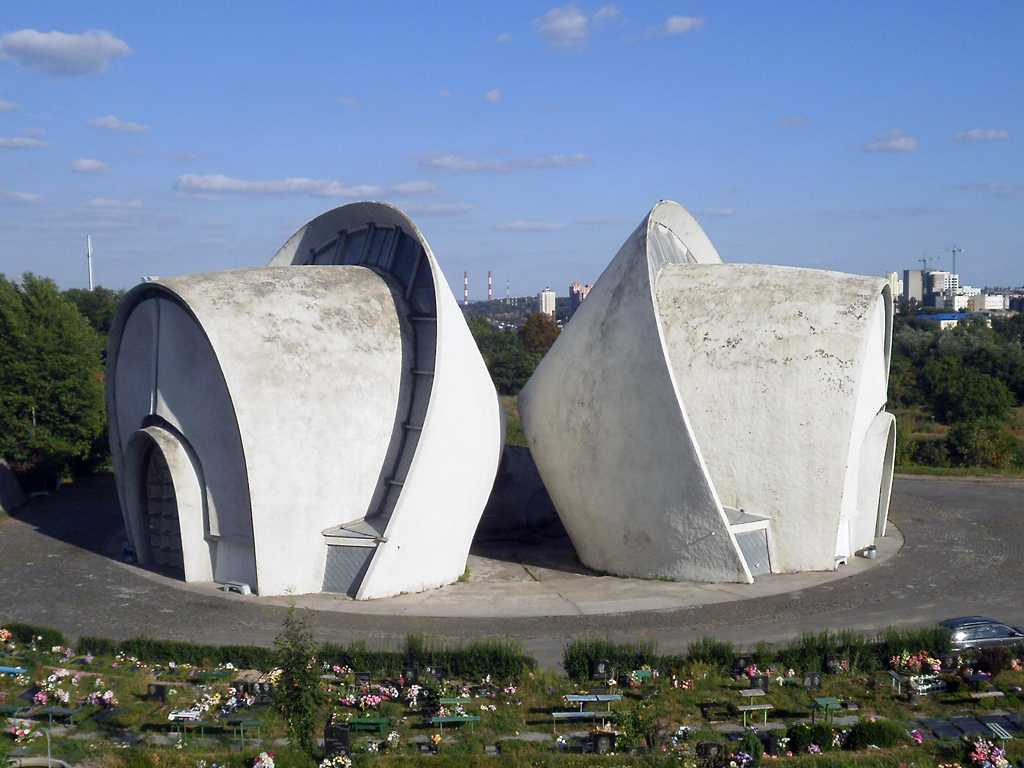 на Байковом кладбище